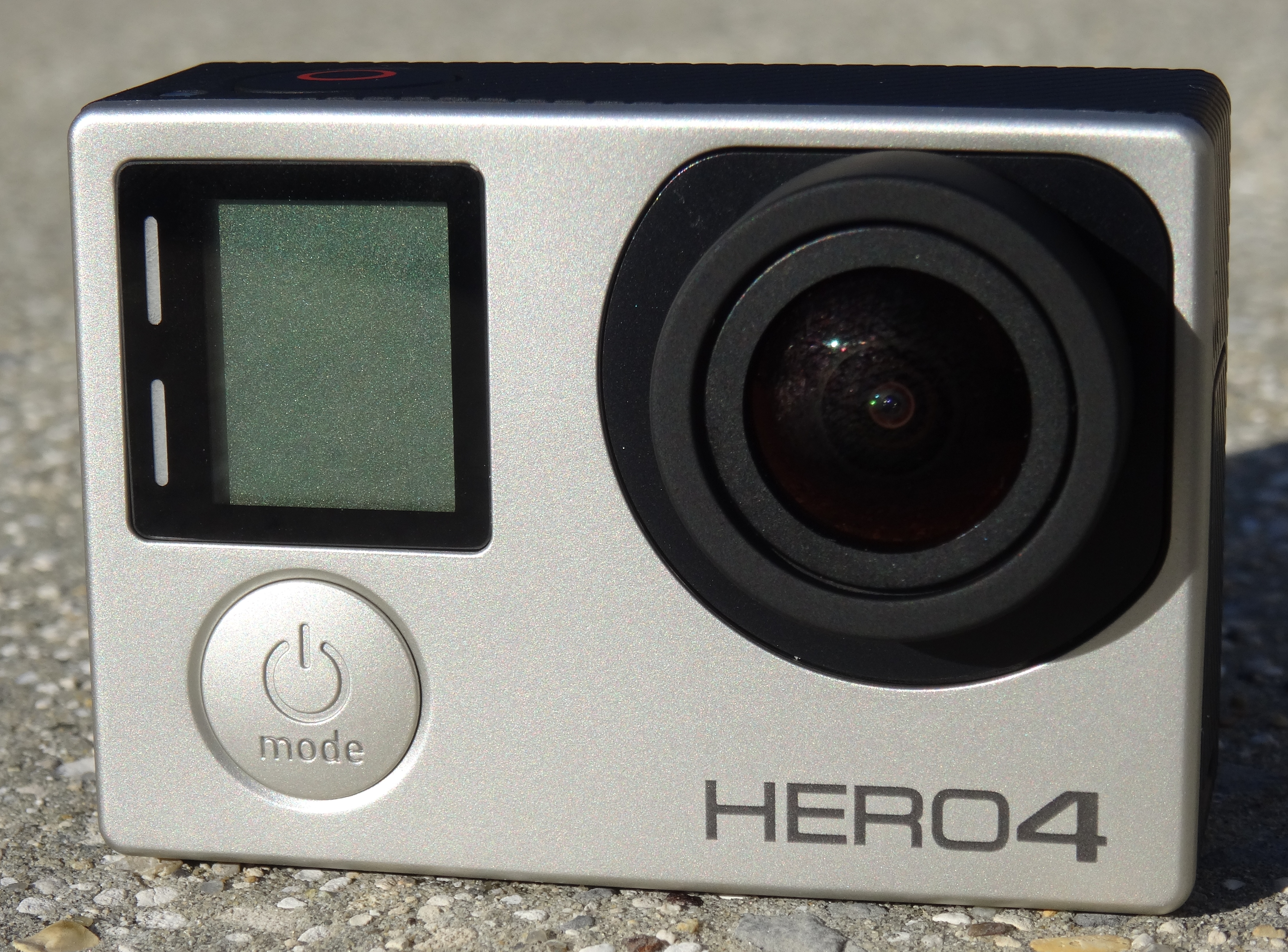 Cyclisme & GoPro : GoPro Hero 4 et accessoires.